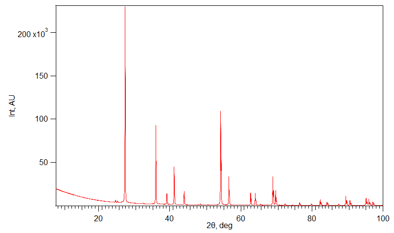 Difraktogramm TiO2 rutiili faasist. Pigmendi puhtusega proov. XRD diffractogram of TiO2 in rutile phase. Sample was pigment-grade.